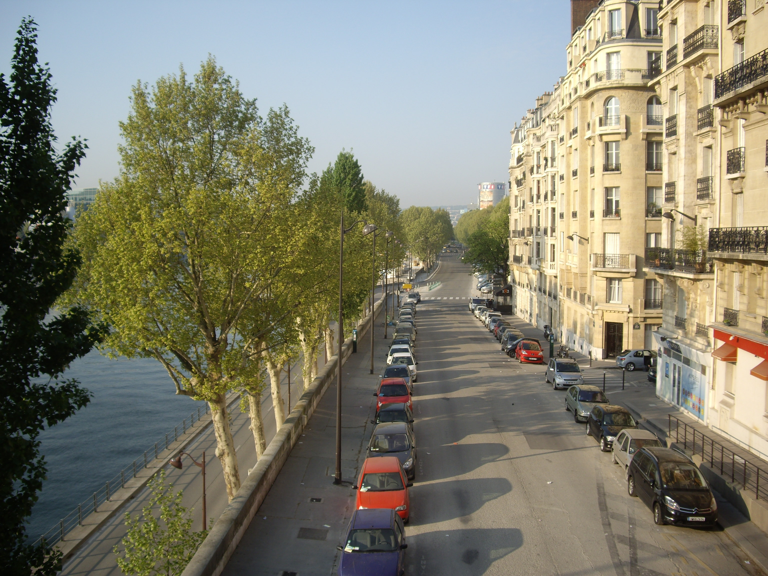 Quai Louis-Blériot et quai Saint-Exupéry, Paris 16e. Vus depuis le pont de Garigliano, vers Boulogne-Billancourt. Sur la gauche, l'entrée de la voie Georges-Pompidou. Sur la droite, l'entrée de la rue Fantin-Latour.